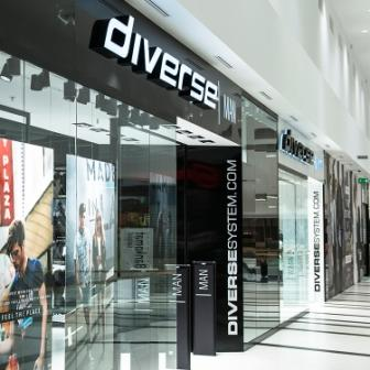 salon Diverse strefa wejścia